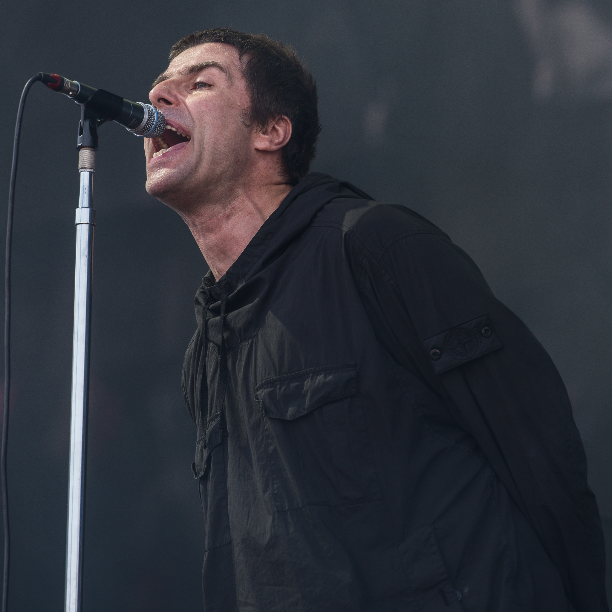 ARGO-Konzerte,Beck's Park Stage,Konzert,Liam Gallagher,Livekonzert,Livemusik,Musik,RiP,Rock im Park 2017